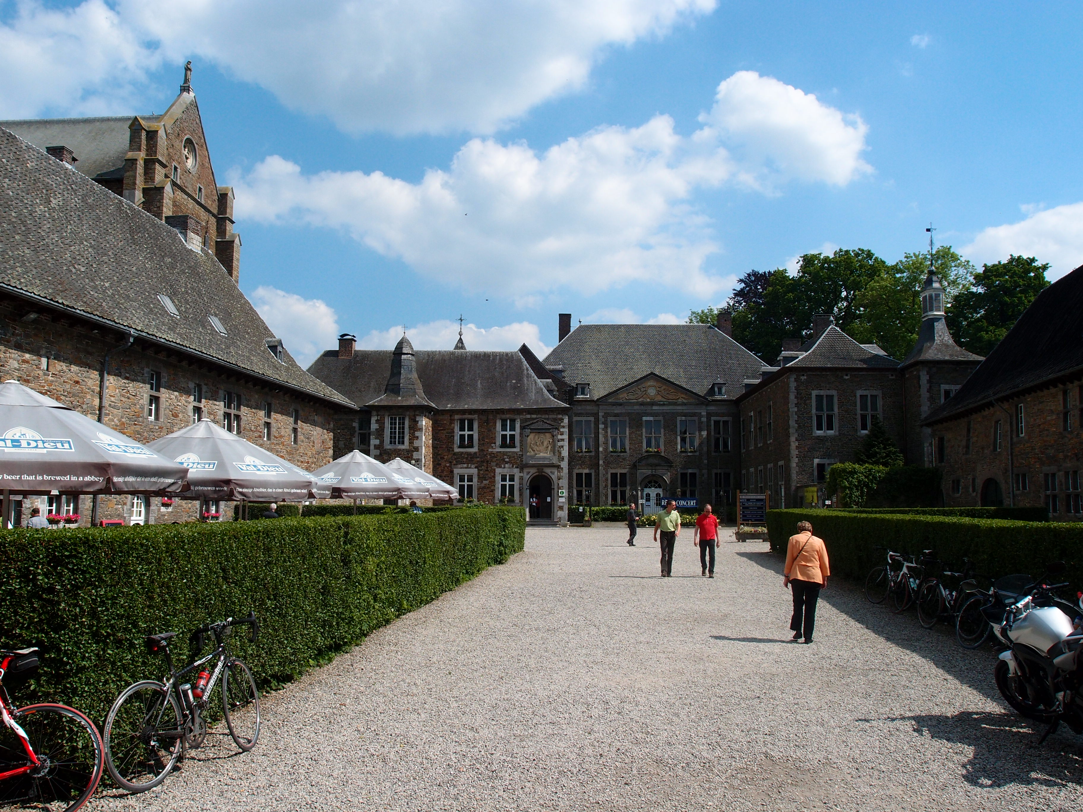 Belg. Kloster Val-Dieu (mit Brauerei, im vorderen rechten Gebäudetrakt) Datum: 29.05.2014 Urheber: M. Pfeiffer alias Benutzer:Gordito1869 Quelle: Privates Fotoarchiv des Urhebers